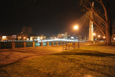 Красношкольная набережная